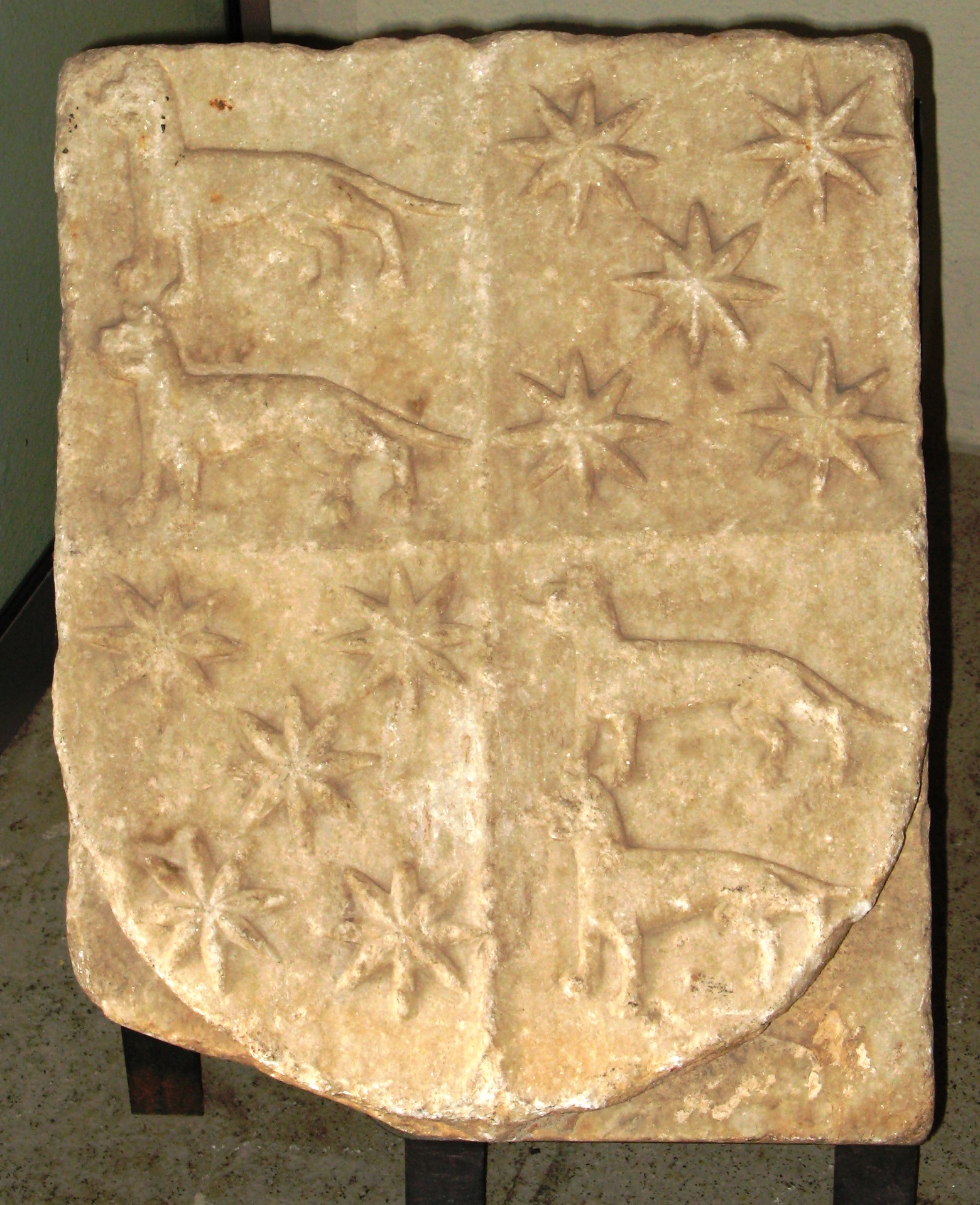 Armas de Constaza Osorio